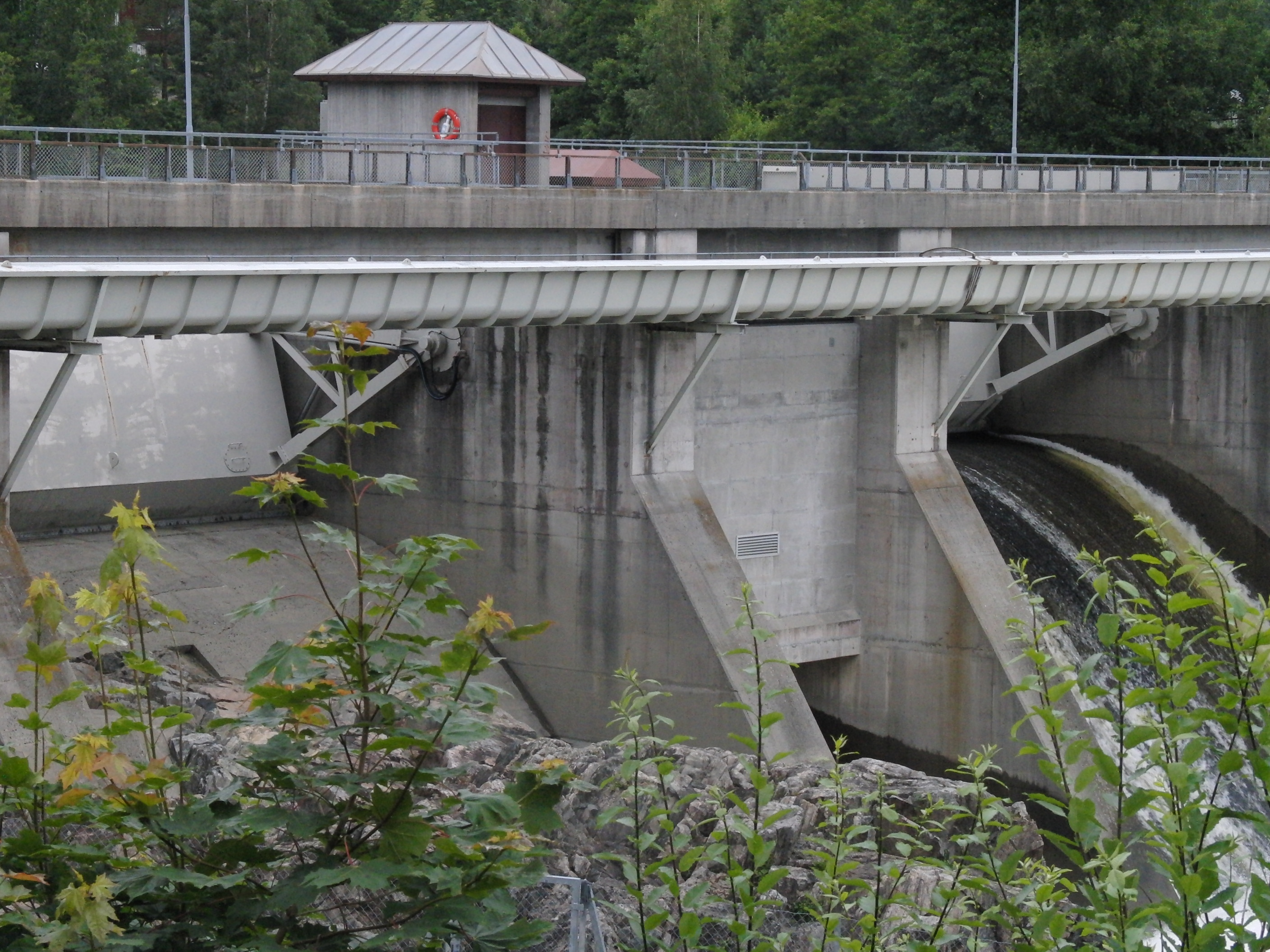 Rygene miniaggregat